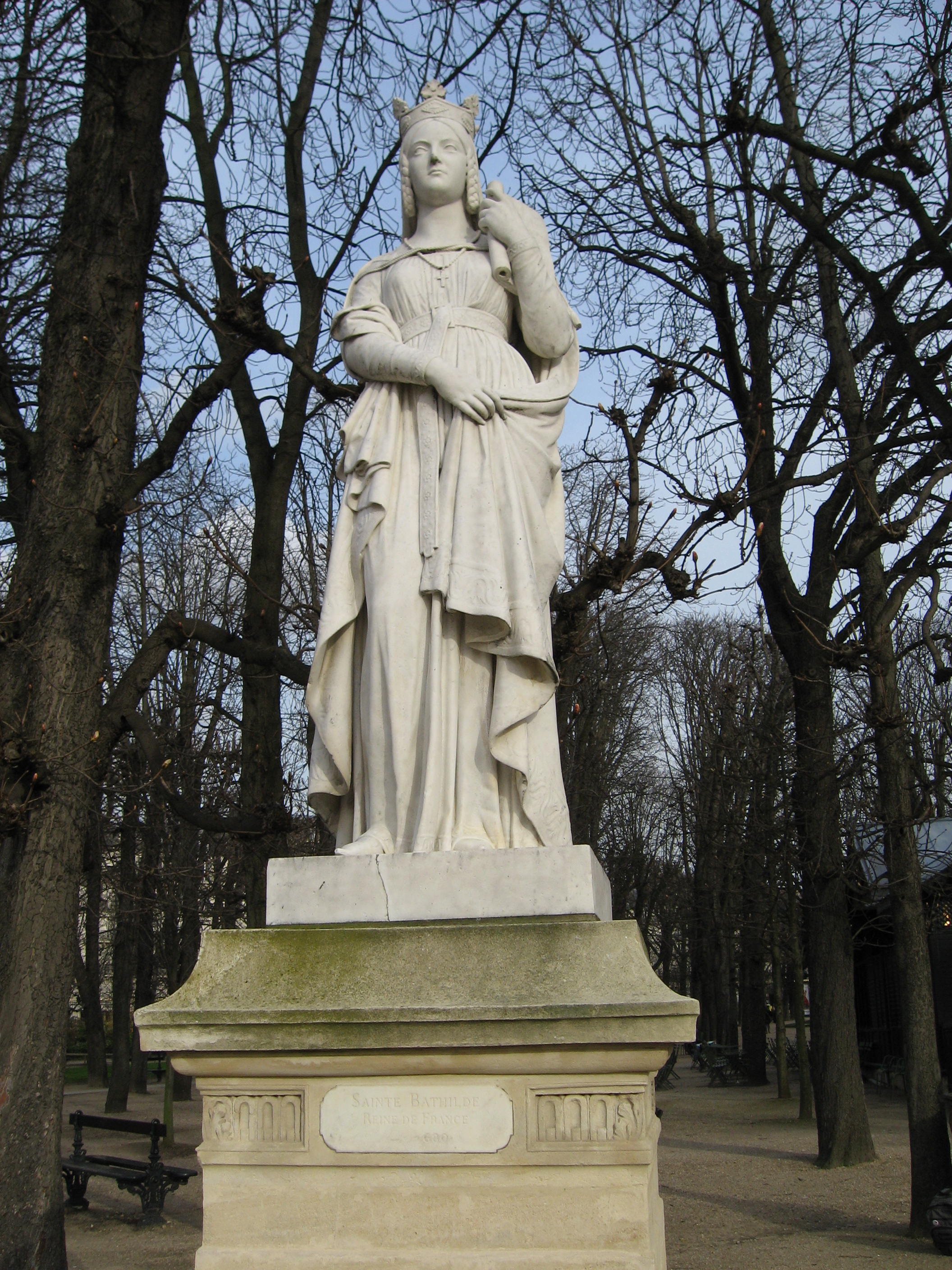 Victor Thérasse (1796-1864): Sainte Bathilde, Reine de France (626-680) ou Bathilde, femme de Clovis II, régente de France, statue en pied (1848), marbre, Paris, Jardin du Luxembourg.